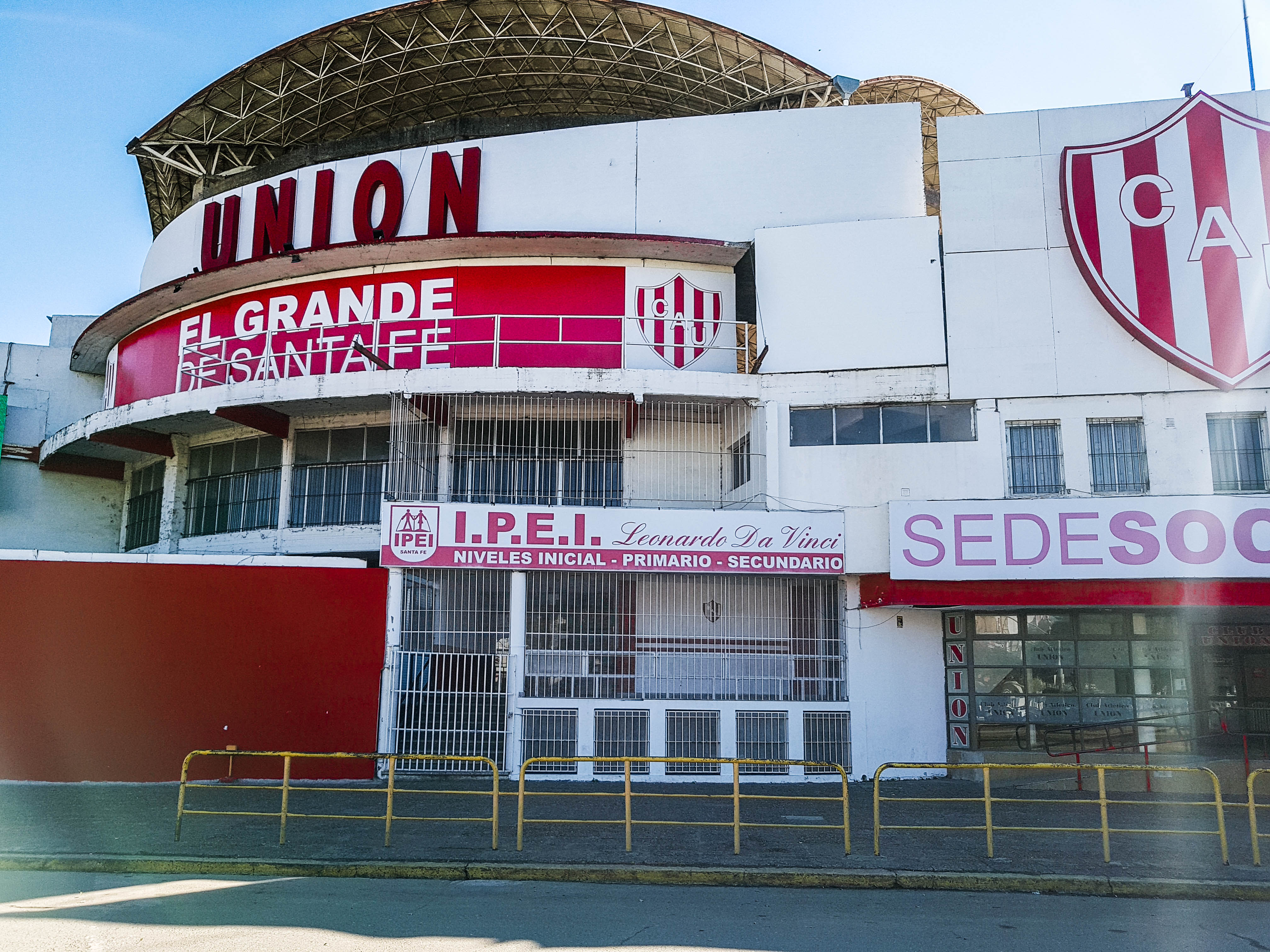 Instituto Privado de Educación Integral (IPEI) - Club Atlético Unión de Santa Fe